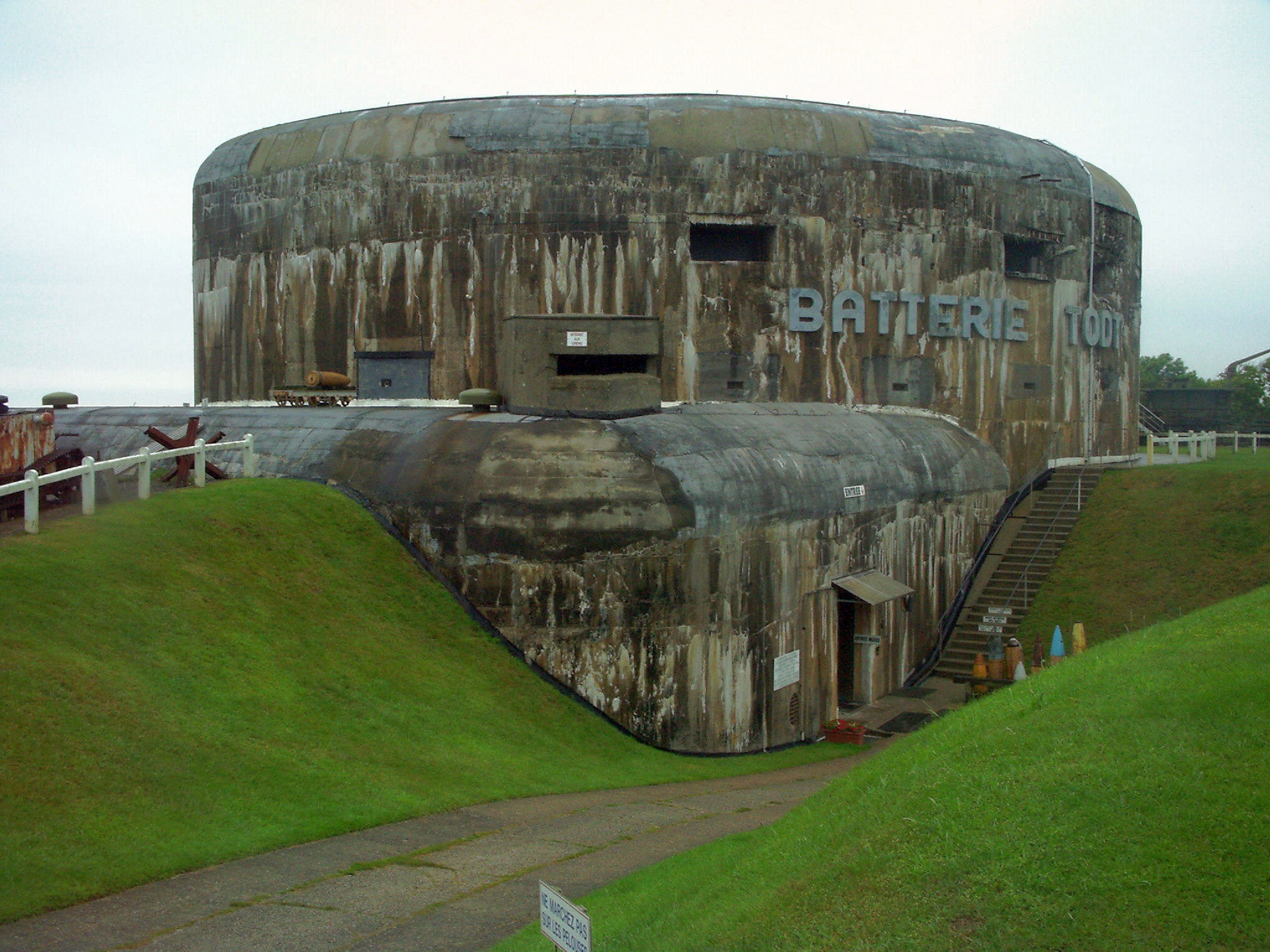 Deutsches Fort bei Cap Gris-Nez, an Frankreichs Kanalküste, der Côte d'Opale, in der Region Nord-Pas de Calais in Nordfrankreich